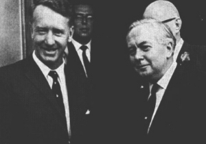 Ian Smith et Harold Wilson en 1965 POLICY STATEMENT This Embassy believes passionately in freedom of speech, and the dissemination of information in that respect to as wide an audiance as possible. As such, our home produced documentation is free to be used by all. At the same time, we also recognize the fact that people have title to their own material in respect of copyright. We try to ensure that any outside material we use respects recognized international copyright regulations. Please let us know if any of the material made available by us contravenes your copyright, providing supporting documentary evidence of that fact, and we shall promptly remove it, or resolve the issue with you in order to keep the information publicly available, thank you.